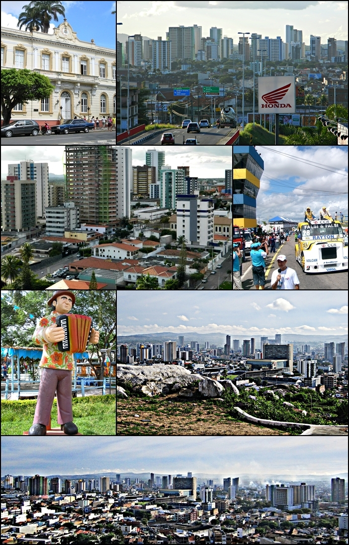 Montagem de fotos - Caruaru, Pernambuco, Brasil